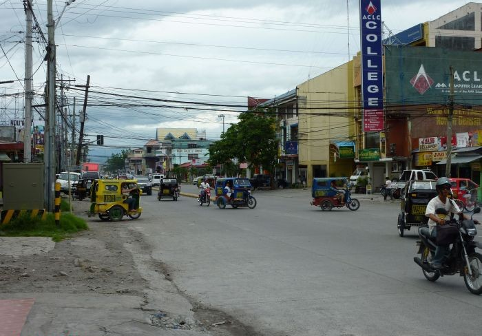 Gensan, Straße